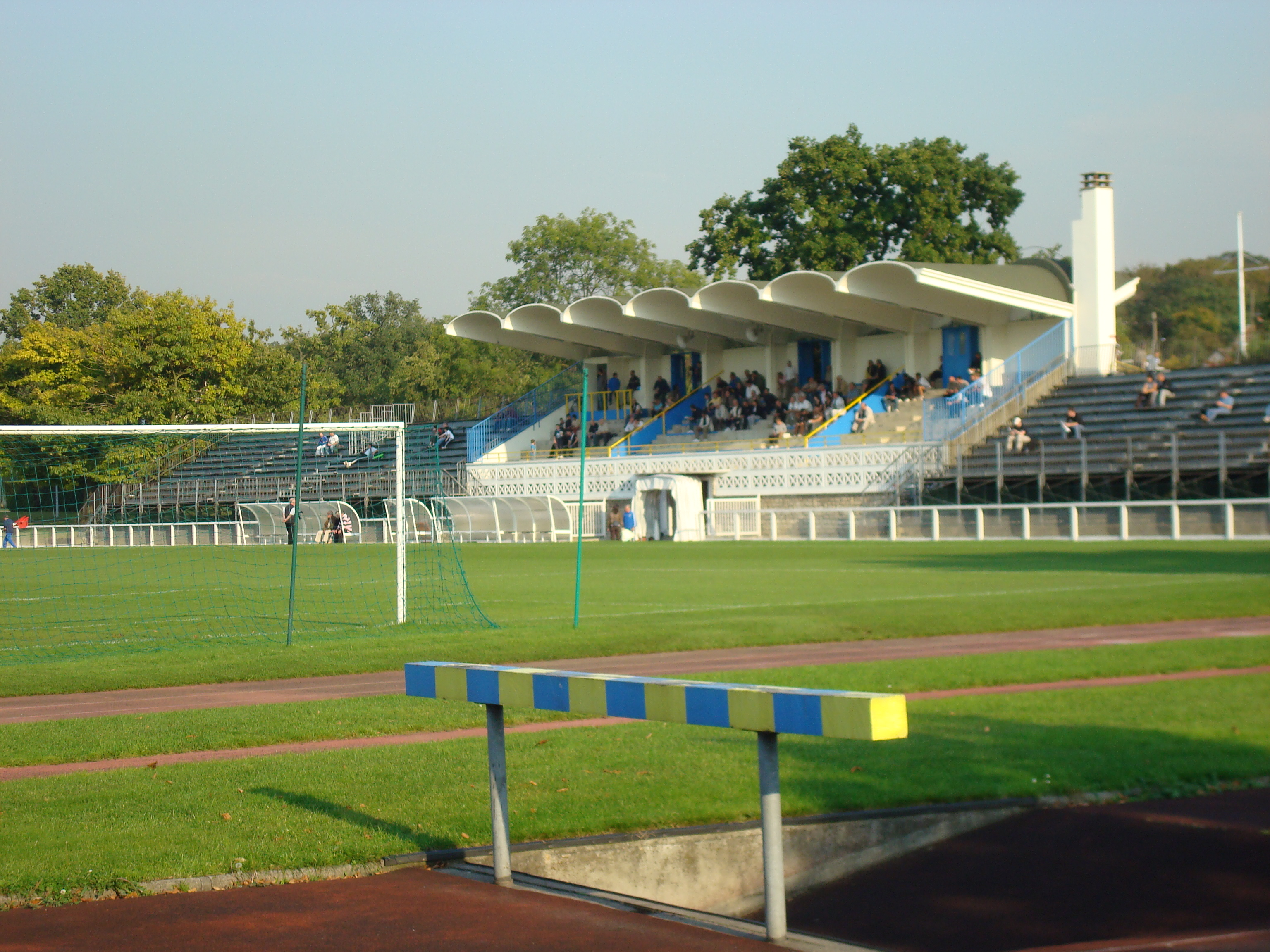 Tribunes en voile mince de béton armé et tribunes métalliques du terrain Roger Quenolle du stade Léo-Lagrange à Poissy.